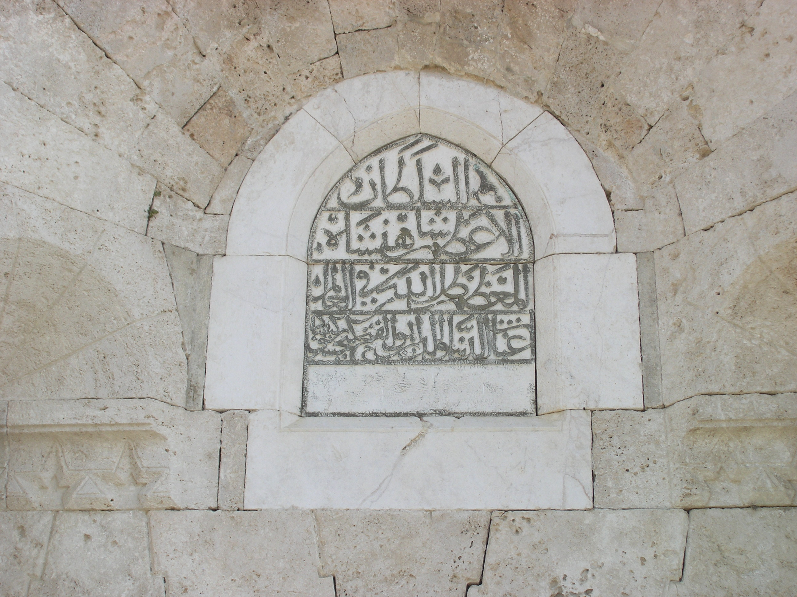 Șarapsa Han ist eine Karawanserei im Süden der Türkei. Stifter-Inschrift über dem Haupteingang.